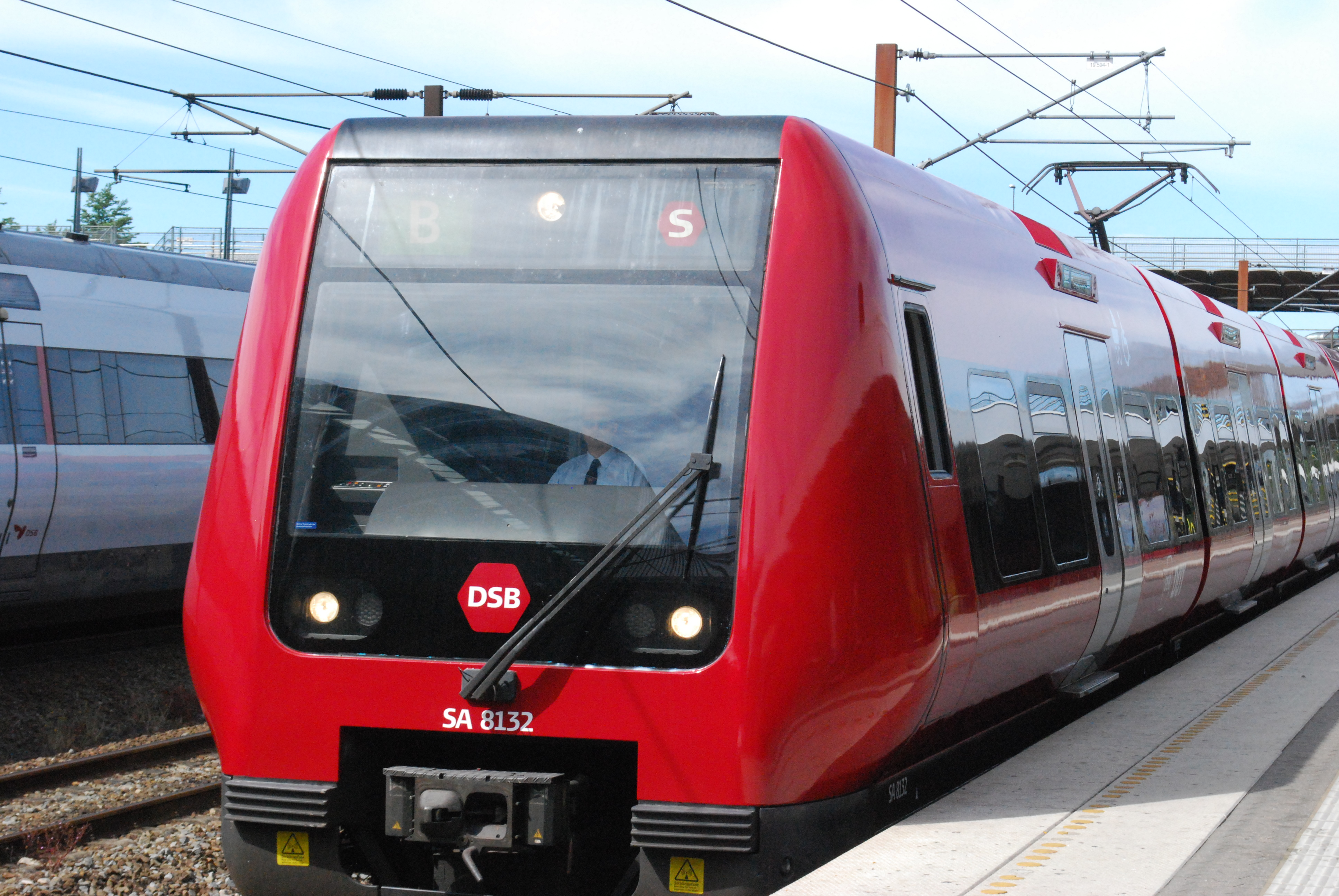 S-tog i nyt design - 29. juni 2018 i Høje Taastrup